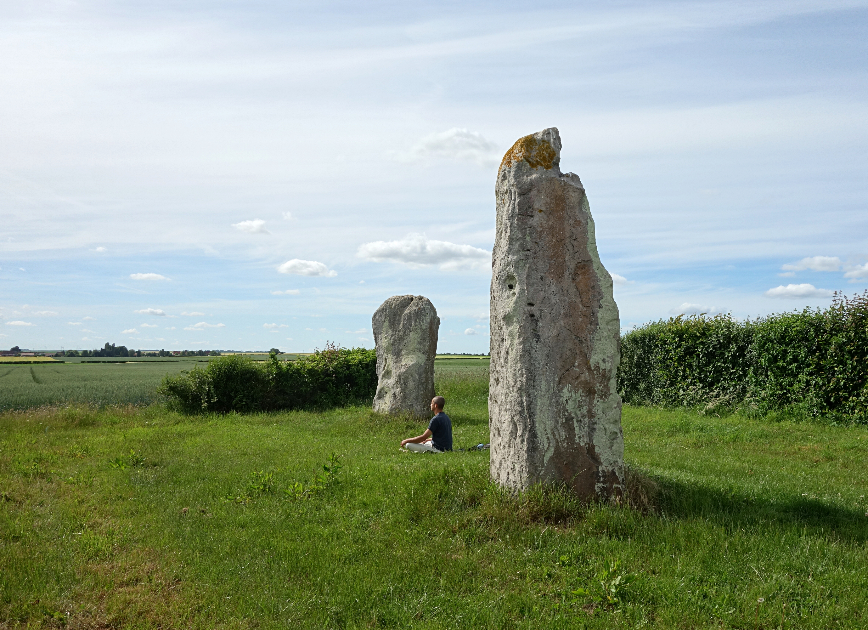 Les Pierres Jumelles à Mont-Saint-Eloi.